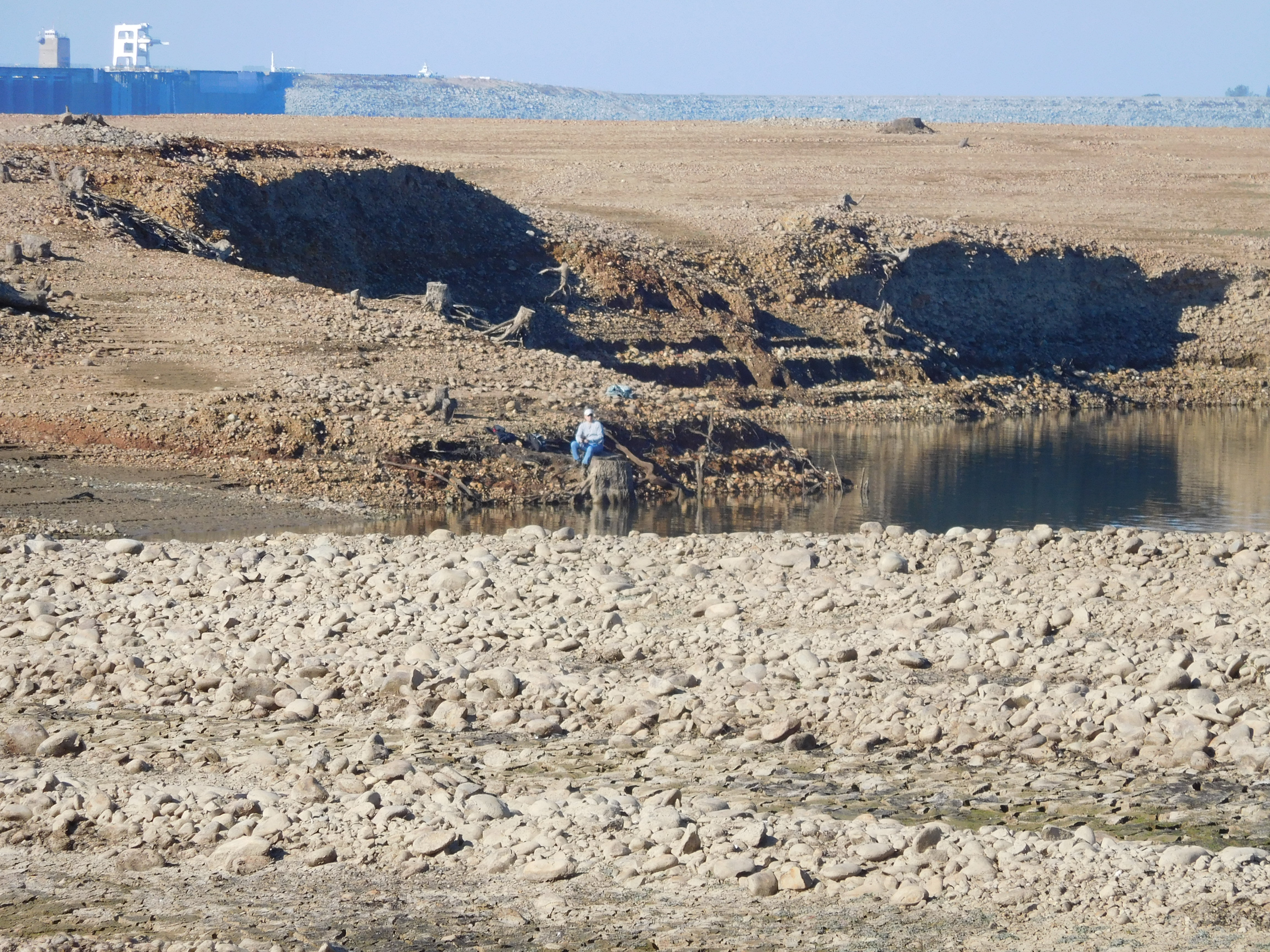 Folsom Lake 71: Nov. 2015